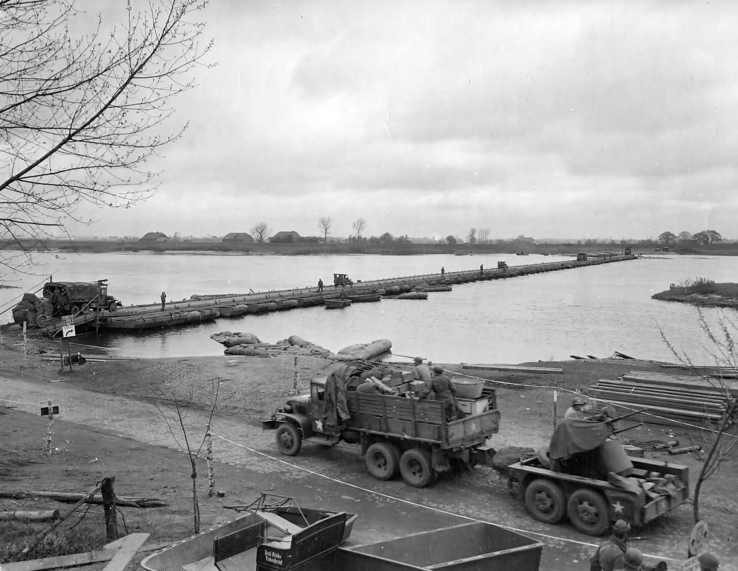 Pontonbrücke der Ninth United States Army über die Elbe bei Bleckede